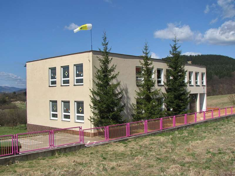 zastranie